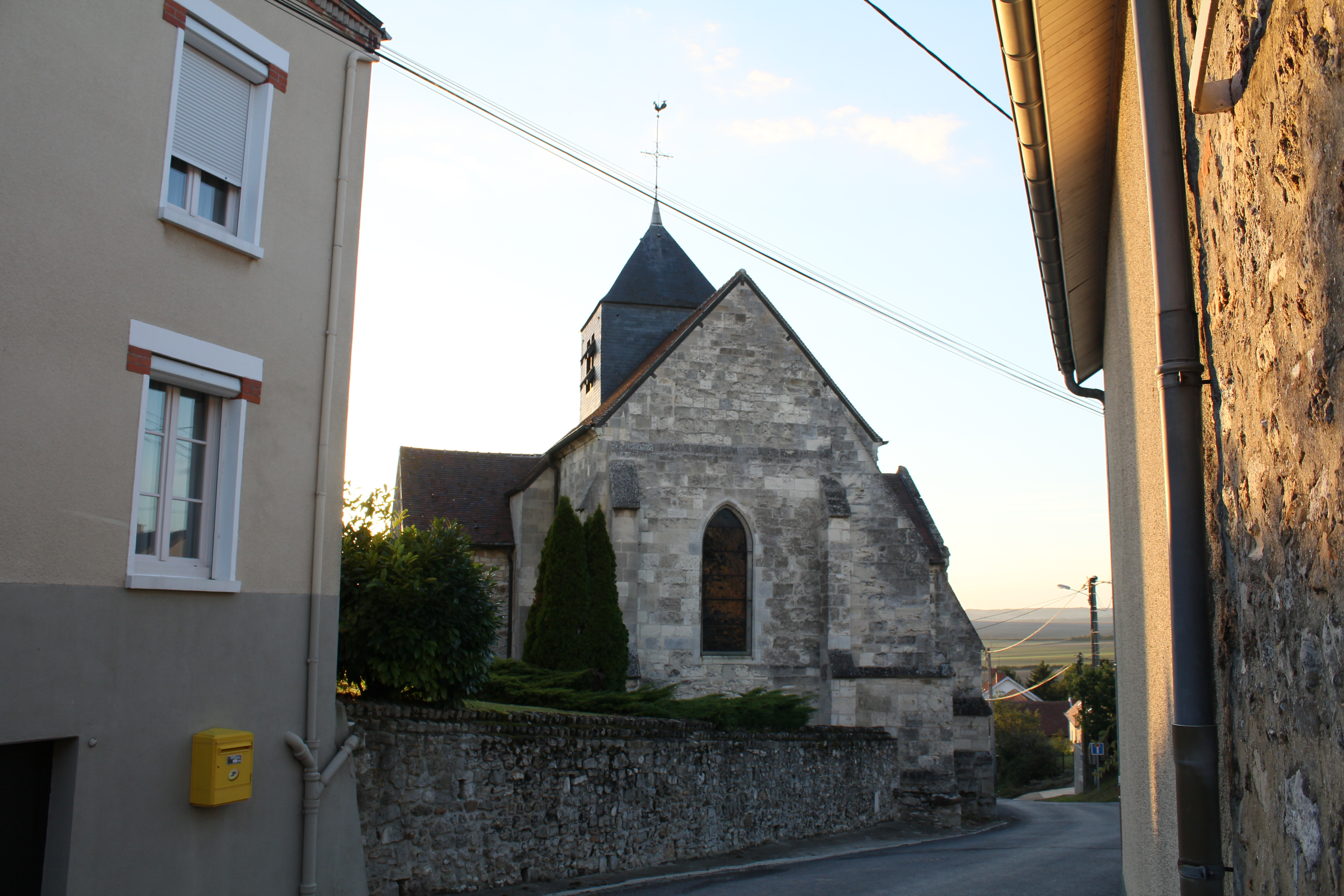 Église Saint-Remi d'Olizy, (Classé, 1921)